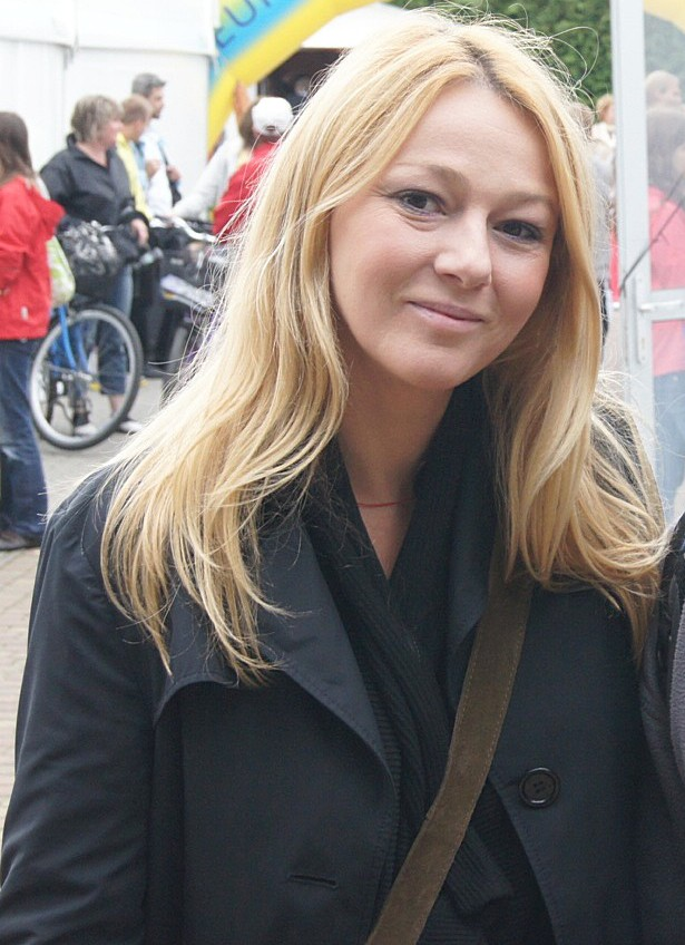 Katarzyna Kwiatkowska, polish actress.